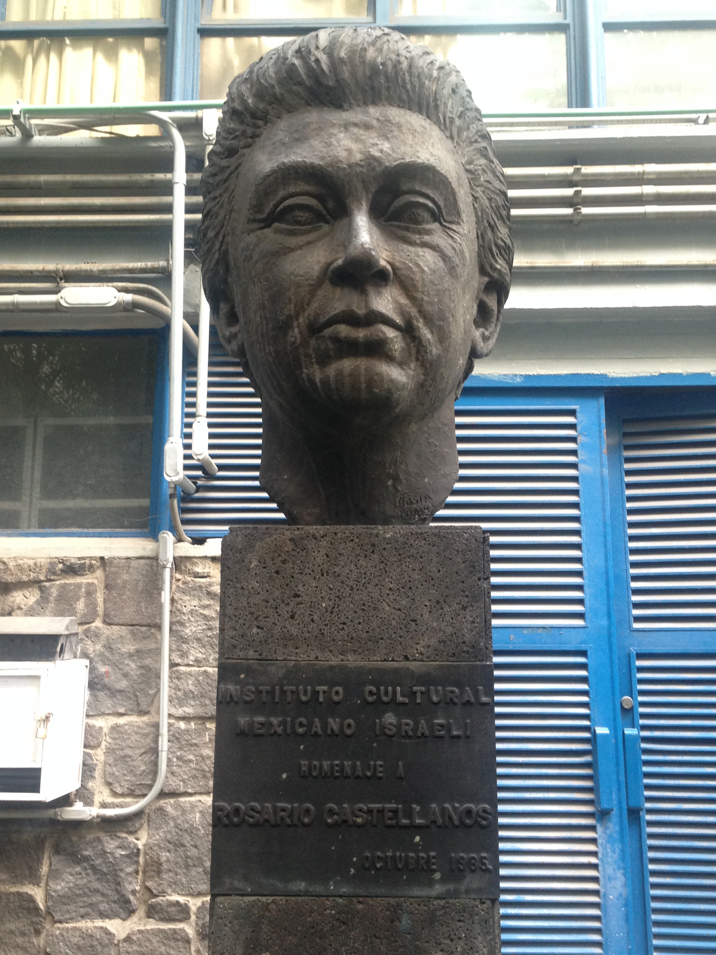 Busto de Rosario Castellanos en la Facultad de Filosofía y Letras de la UNAM, México.